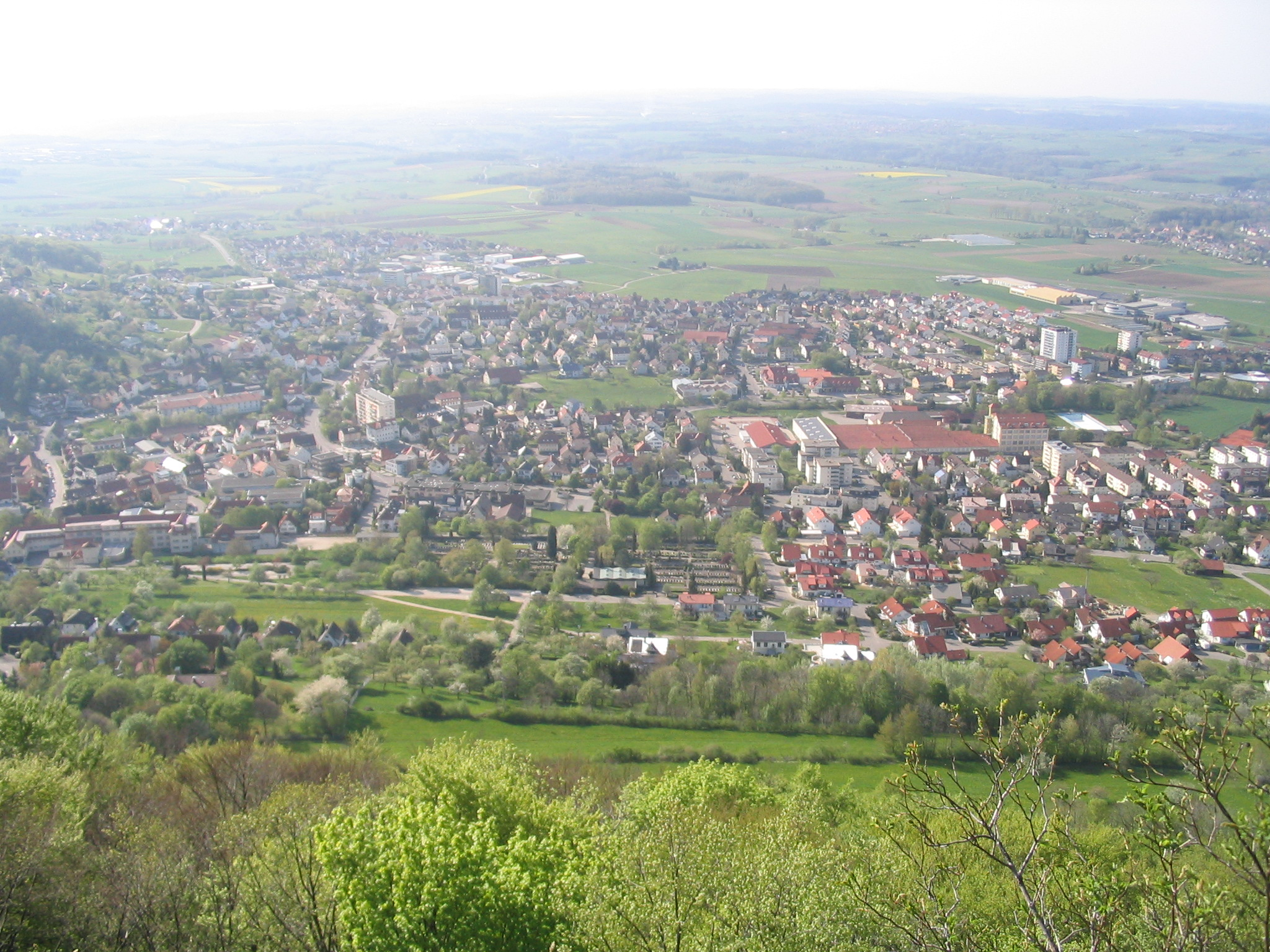 Heubach vom Rosenstein aus gesehen